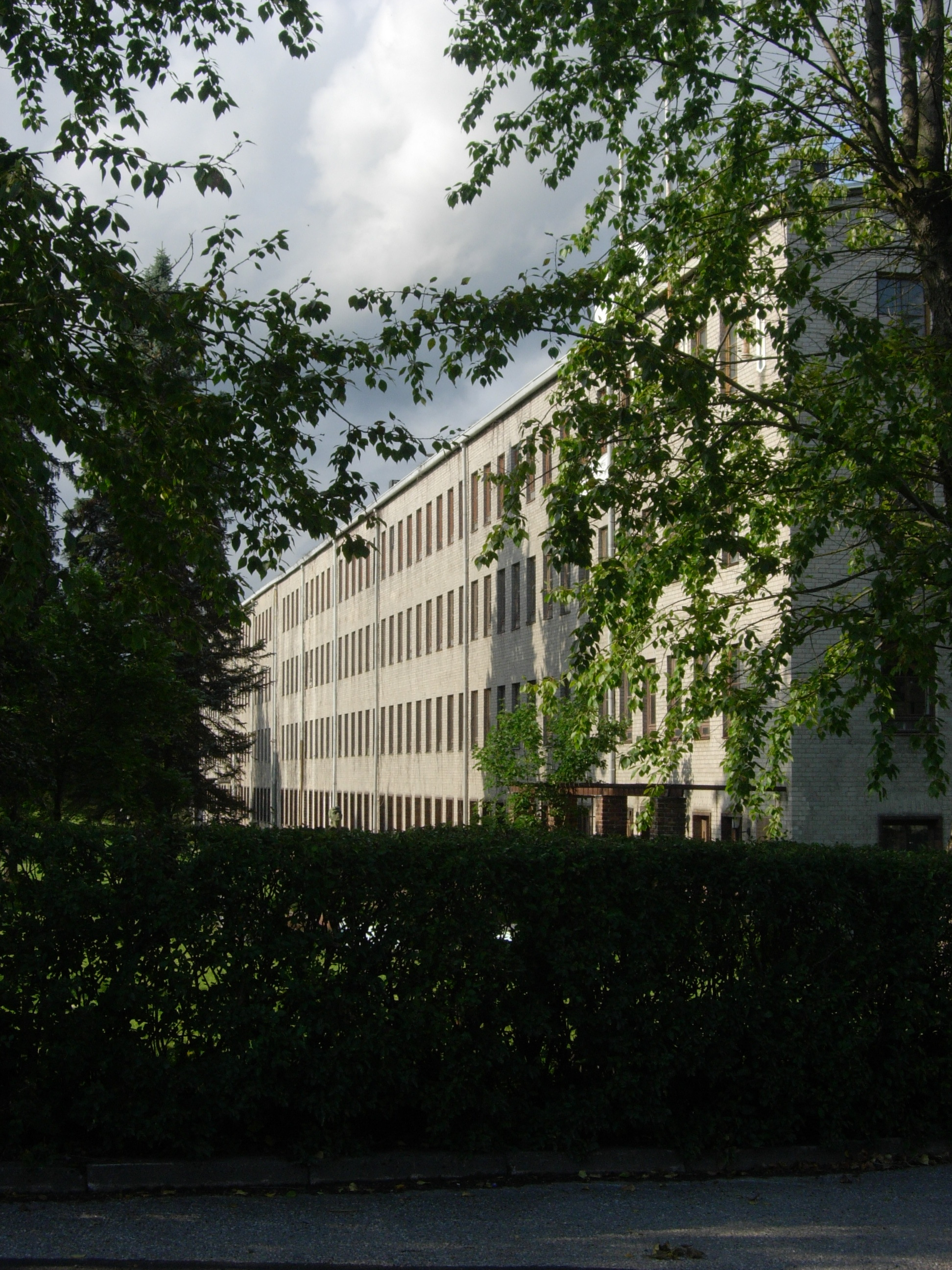 Hellaksen eli Leafin makeistehdas, Kärsämäki, Turku.